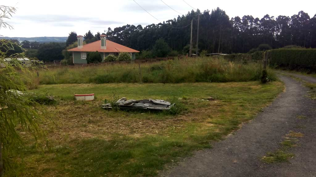 Vista da Lavandeira.